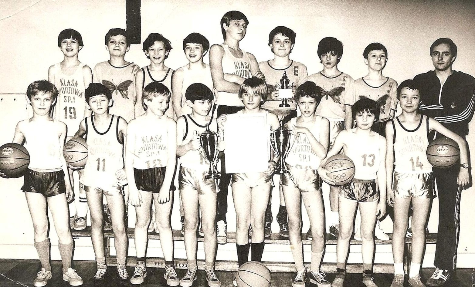 Nauczyciel wf Tadeusz Gutowski